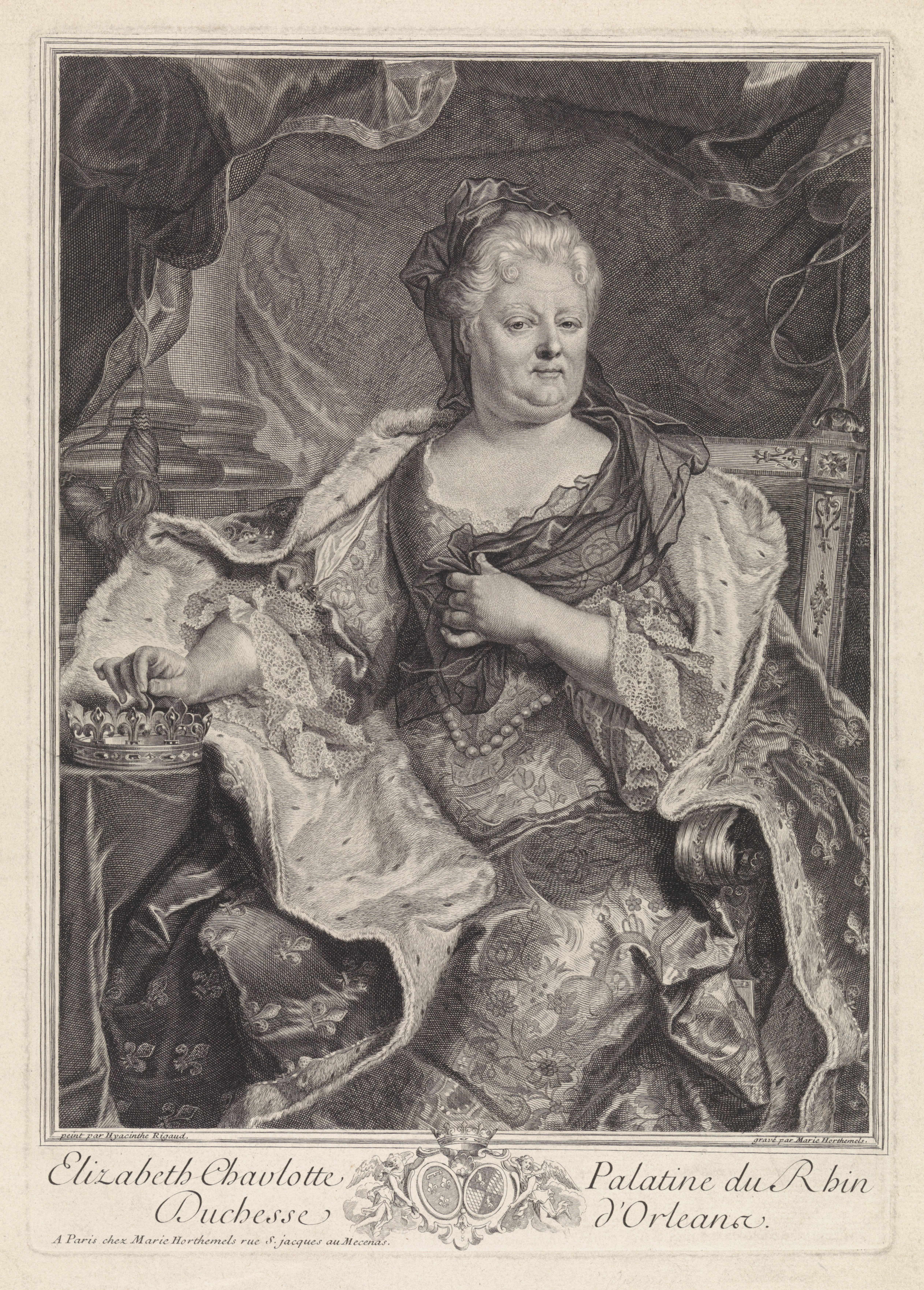 IdentificatieTitel(s): Portret van Elisabeth Charlotte van de Palts, hertogin van OrleansObjecttype: prent Objectnummer: RP-P-1887-A-11879Catalogusreferentie: Collectie Rijksmuseum-1(2)Opmerking: 2 staten in de collectie van het RijksmuseumOpschriften / Merken: verzamelaarsmerk, verso, gestempeld: Lugt 2228Omschrijving: Portret van Elisabeth Charlotte van de Palts, hertogin van Orleans, gekleed in een koningsmantel, haar hand rustend op een kroon.VervaardigingVervaardiger: prentmaker: Marie Horthemels (vermeld op object)naar schilderij van: Hyacinthe Rigaud (vermeld op object)uitgever: Louise Magdeleine Horthemels (vermeld op object)Plaats vervaardiging: ParijsDatering: 1700 - 1767Fysieke kenmerken: gravure en etsMateriaal: papier Techniek: graveren (drukprocedé) / etsenAfmetingen: plaatrand: h 370 mm × b 261 mmOnderwerpWat: royal mantle (symbol of sovereignty)crown (symbol of sovereignty)Wie: Elisabeth Charlotte van de PaltsVerwerving en rechtenVerwerving: aankoop 1887Copyright: Publiek domein